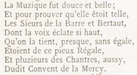 Extrait de la Muze historique de Loret, 1658